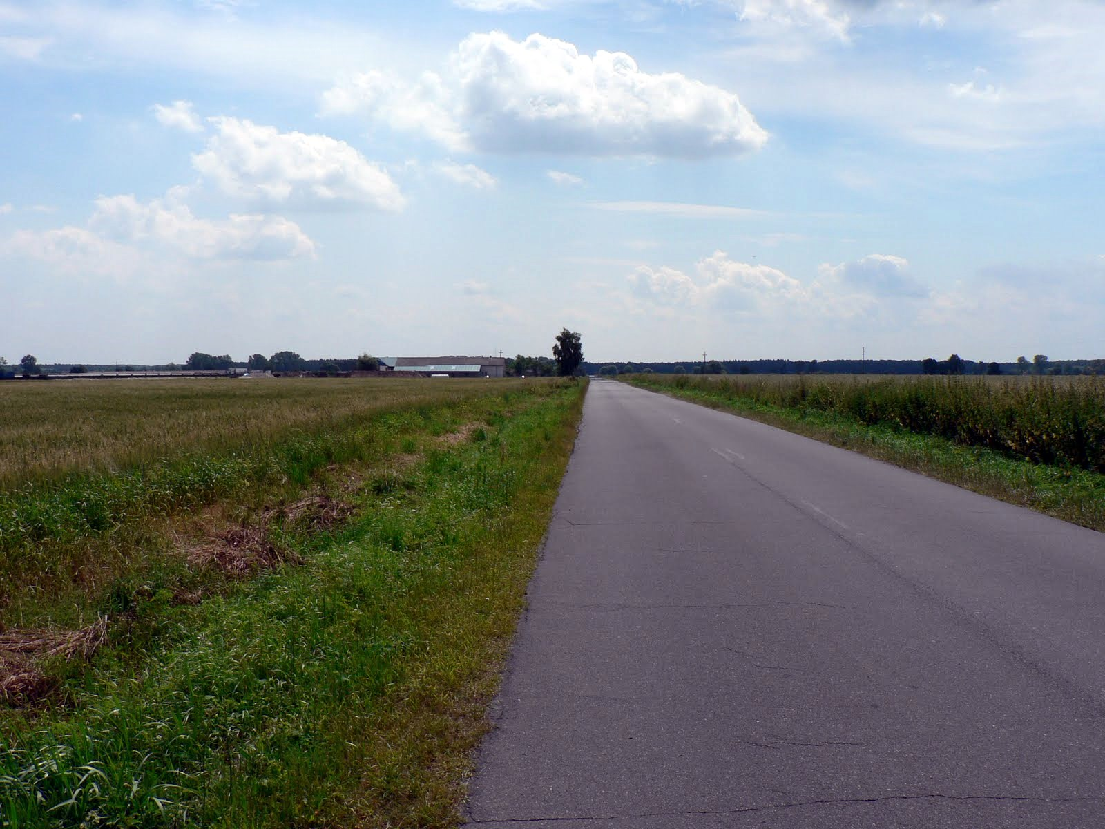 Droga pomiędzy Radomicami a Noskowem w kierunku Noskowa